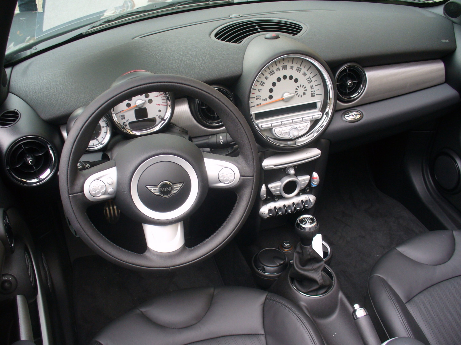 Mini R56 Cabrio